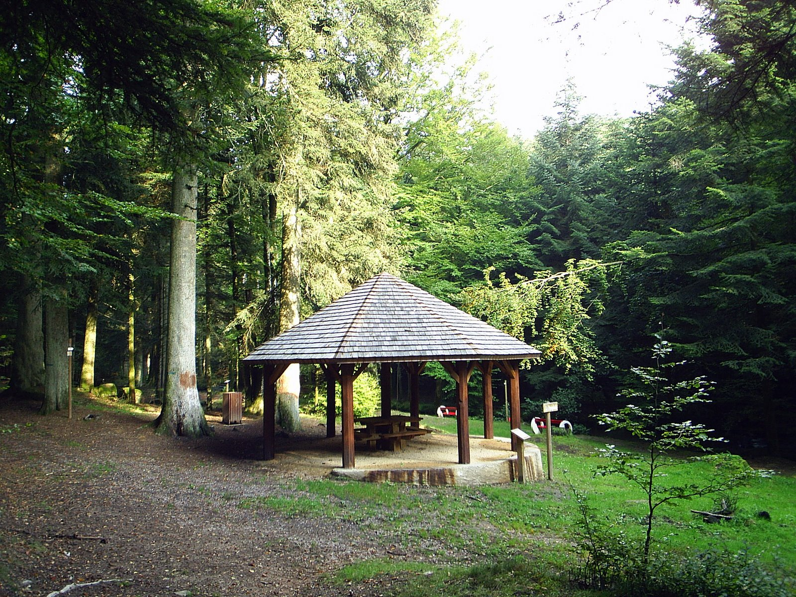 Promenade du Parapluie, Bains-les-Bains.